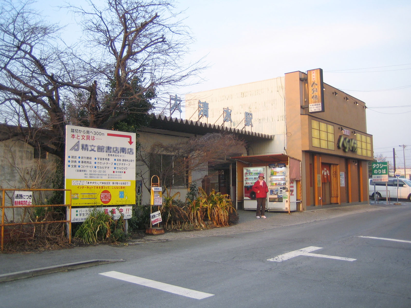 大清水駅。愛知県豊橋市 Ooshimuzu Station (大清水駅), in Toyohashi, Aichi, Japan